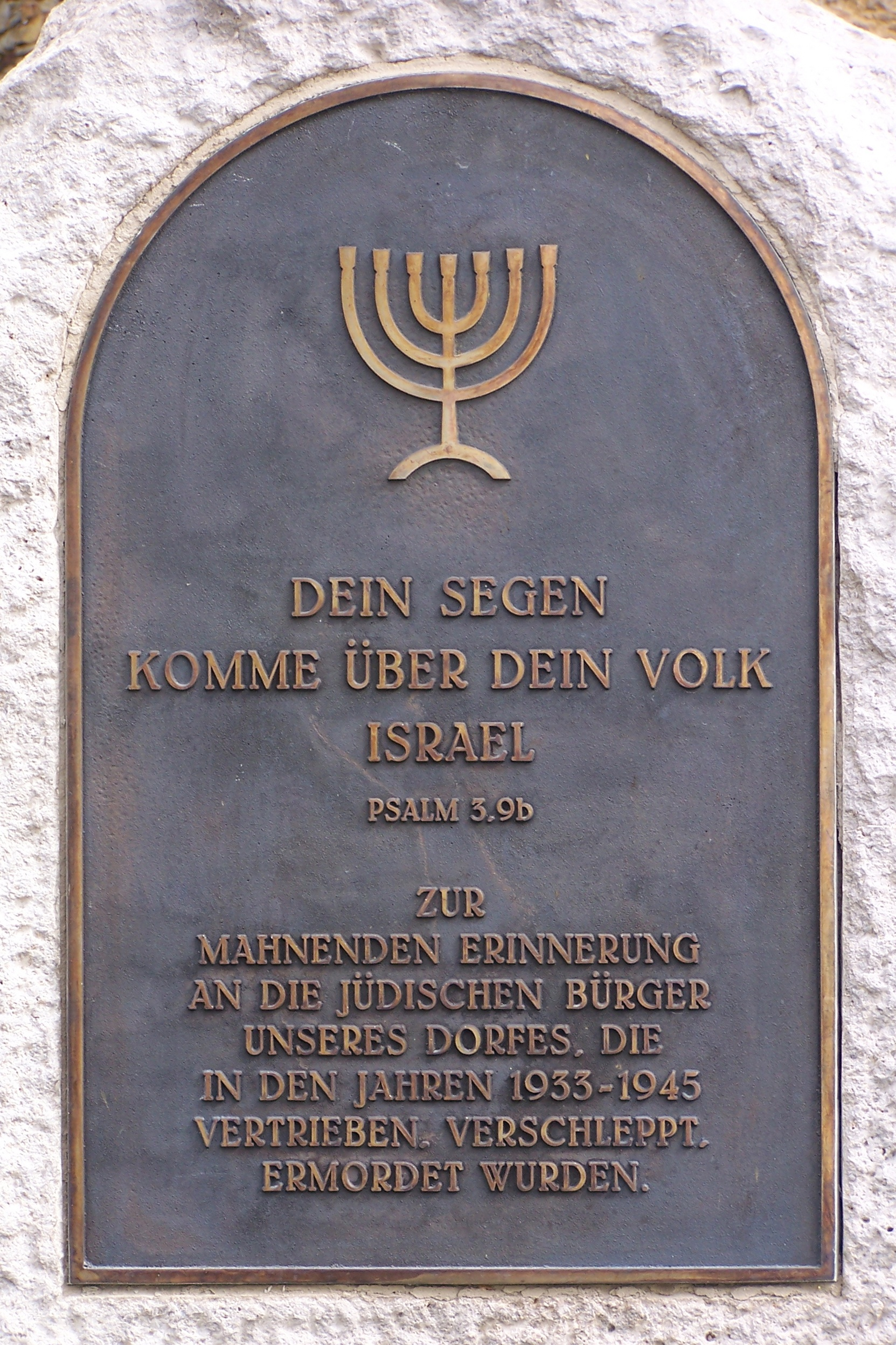 Memorial to the Murdered Jews from Bibra, built in 2007